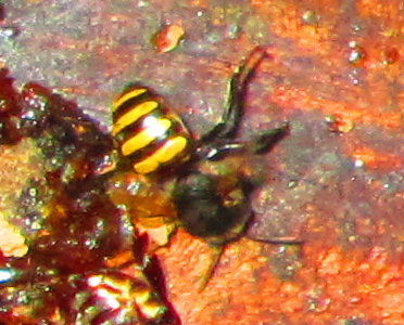 Indivíduo de Melipona mandacaia em caixa racional.